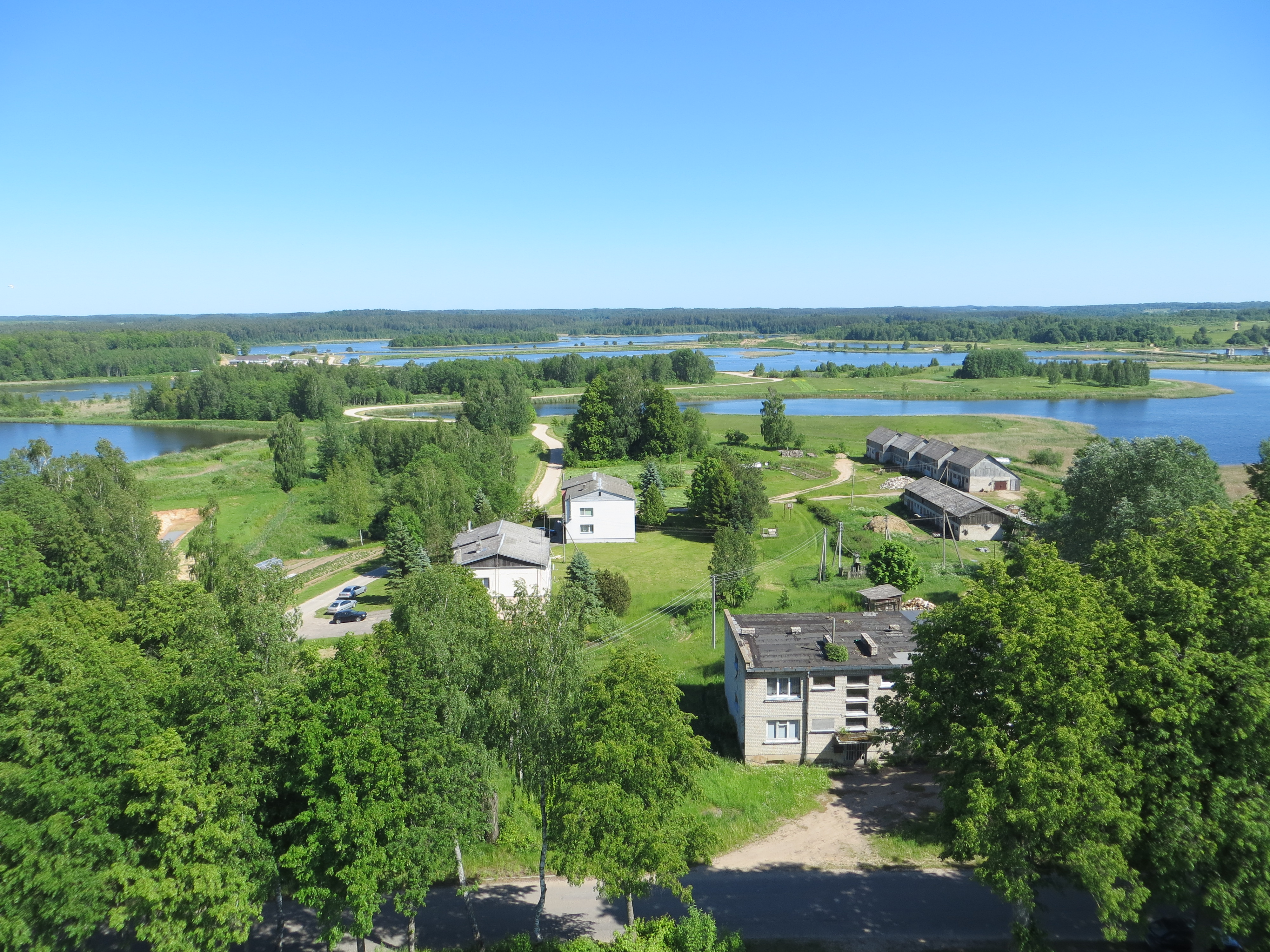 Vasaknos 32241, Lithuania